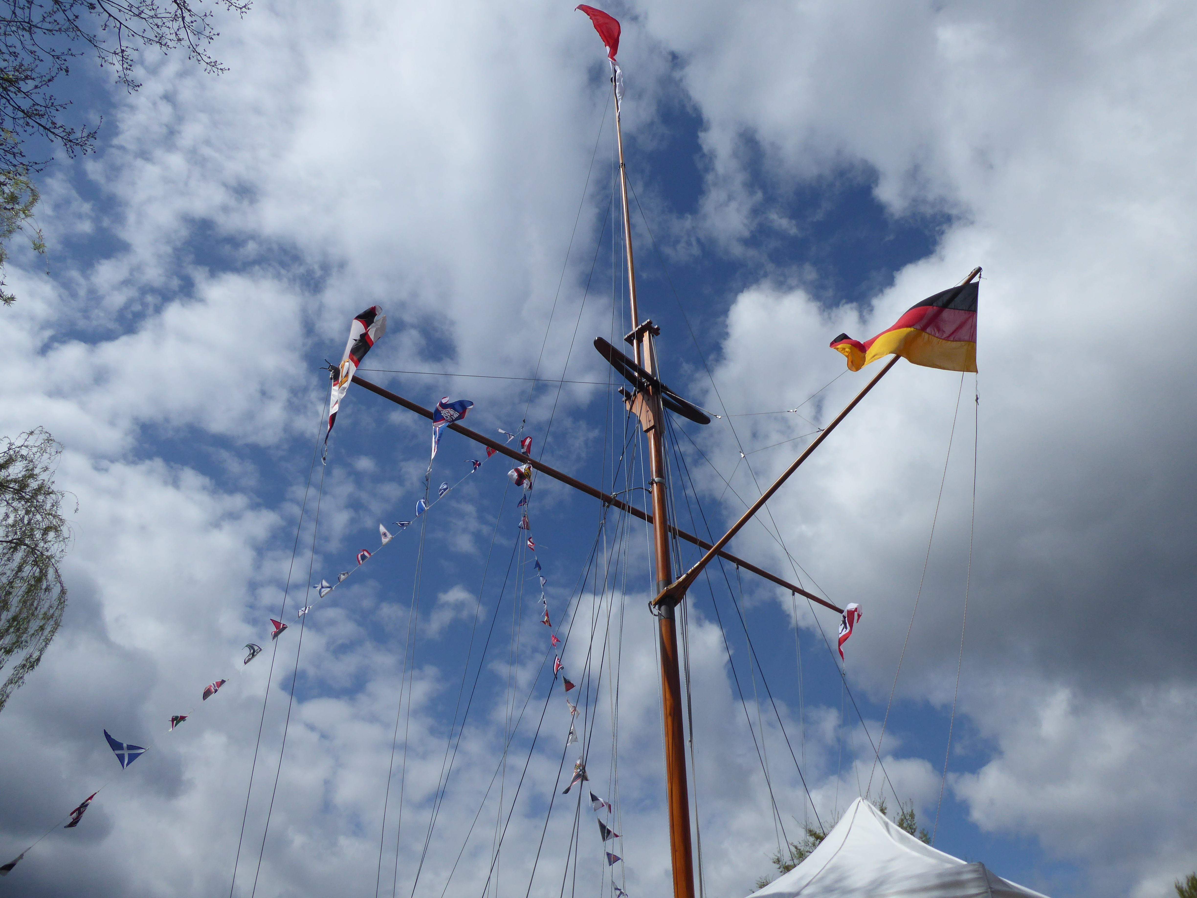 Nikolassee Berliner Yacht-Club Ansegeln 2017